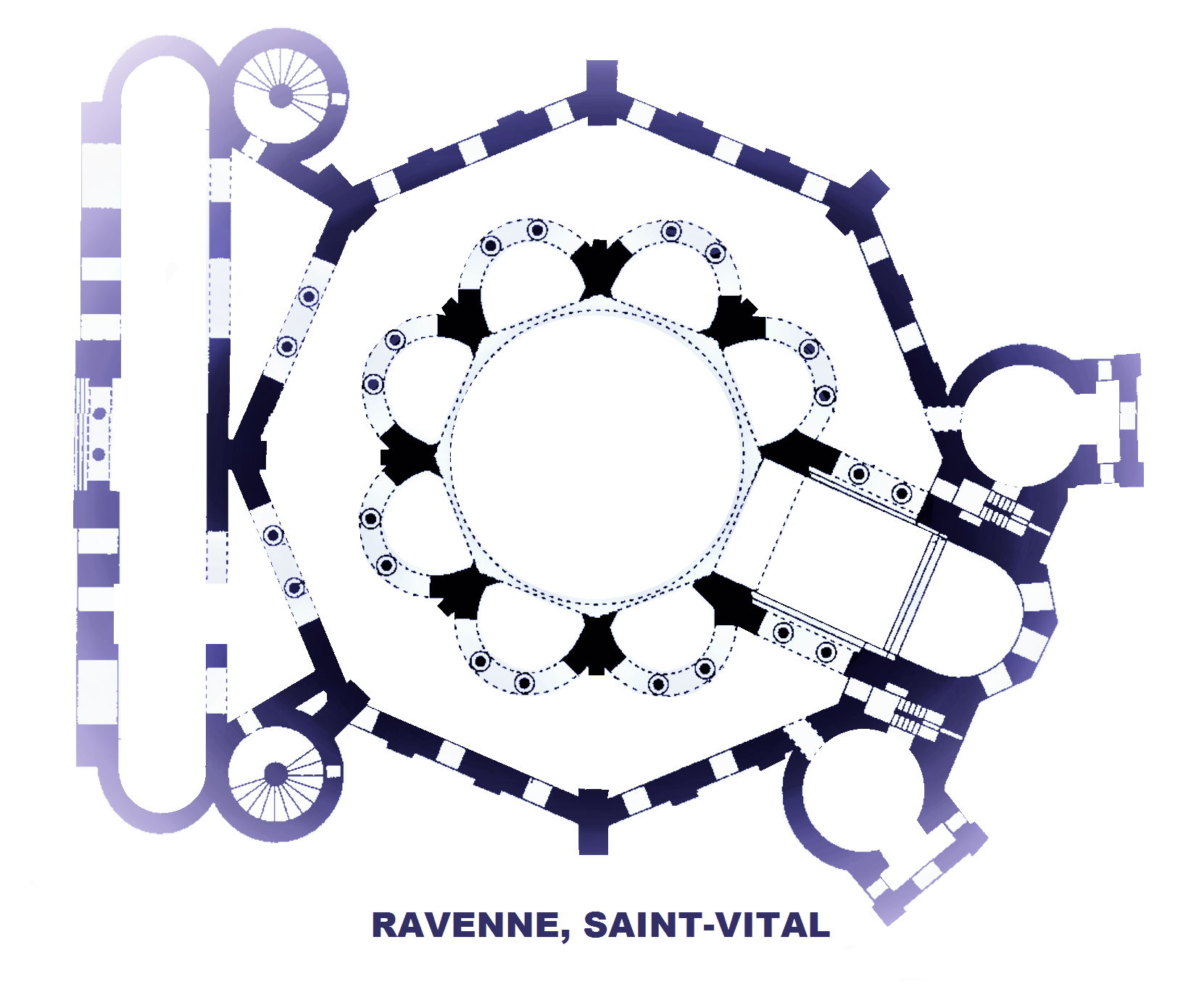 Ravenne, Saint6vital, plan